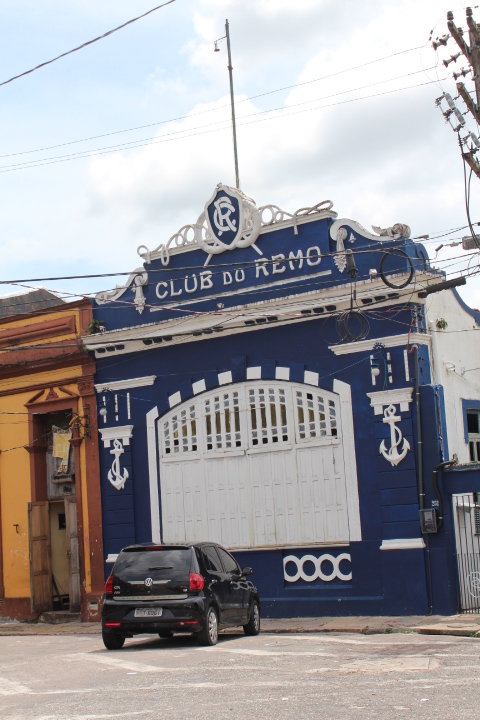 Sede náutica do Clube do Remo.